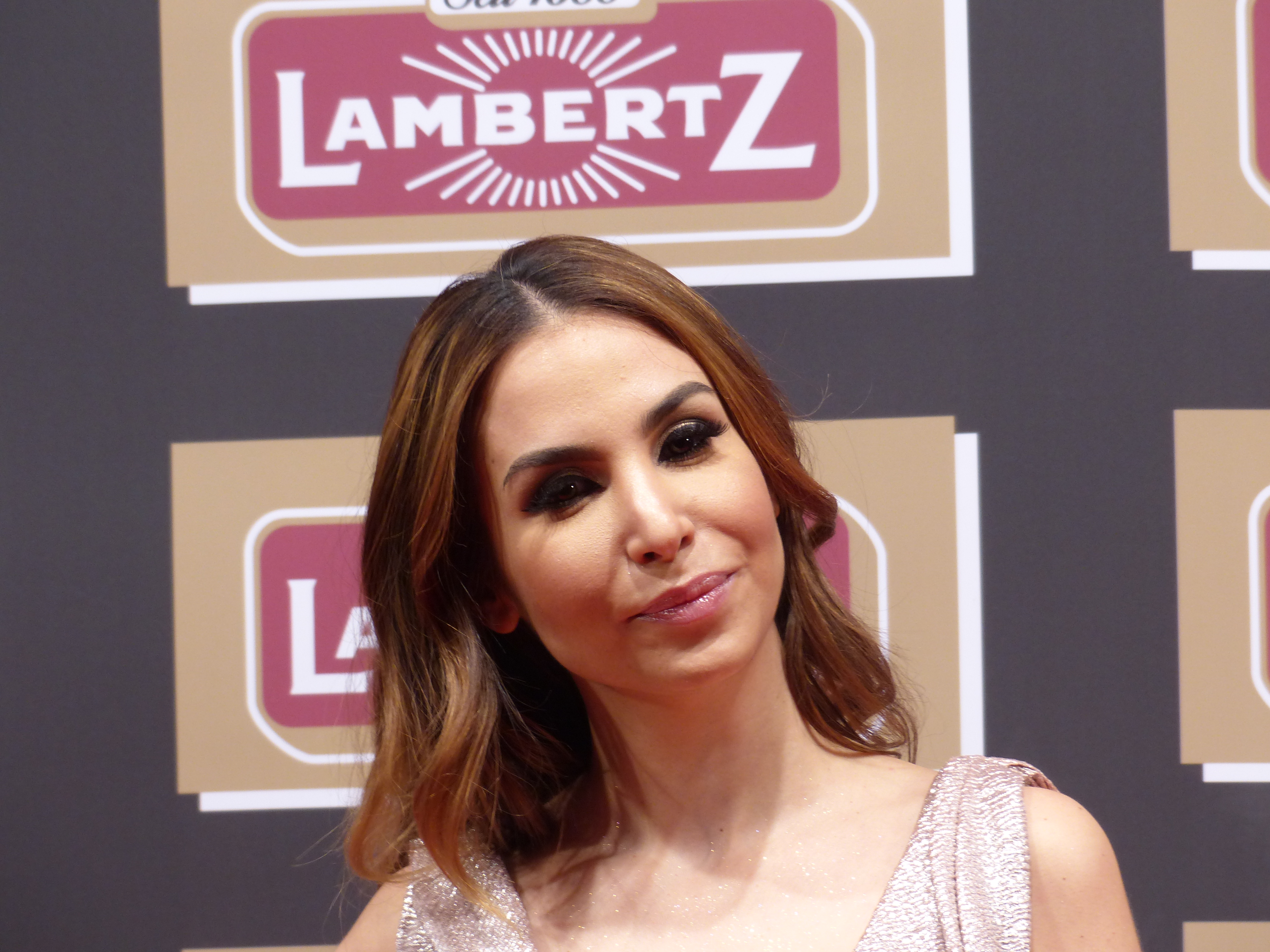 Sila Sahin bei der Lambertz Monday Night, im Februar 2016.